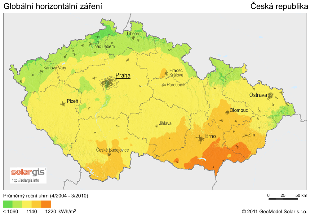 Solar Radiation Map: Mapa slunečního záření pro Českou republiku - globální horizontální záření, SolarGIS 2011. Průměrný roční úhrn.